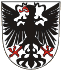 Znak města Chrudim